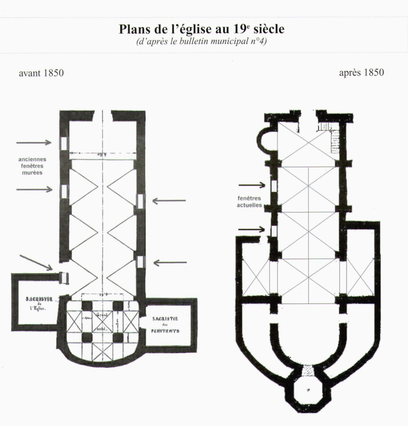 Roiffieux église plans